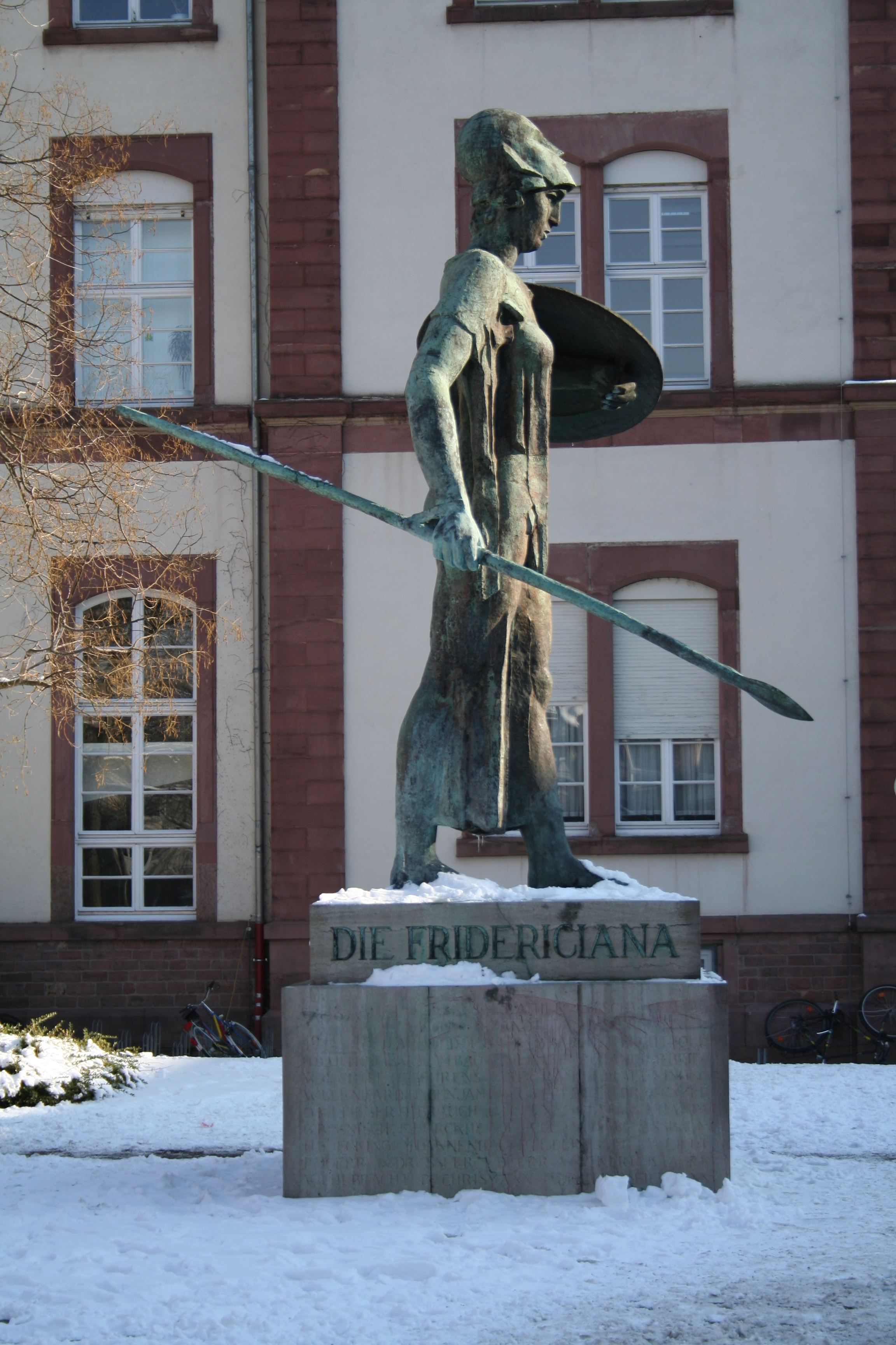 Statue der Pallas Athene im Ehrenhof der Universität Karlsruhe - Fridericiana, Bildhauer: Karl Albiker